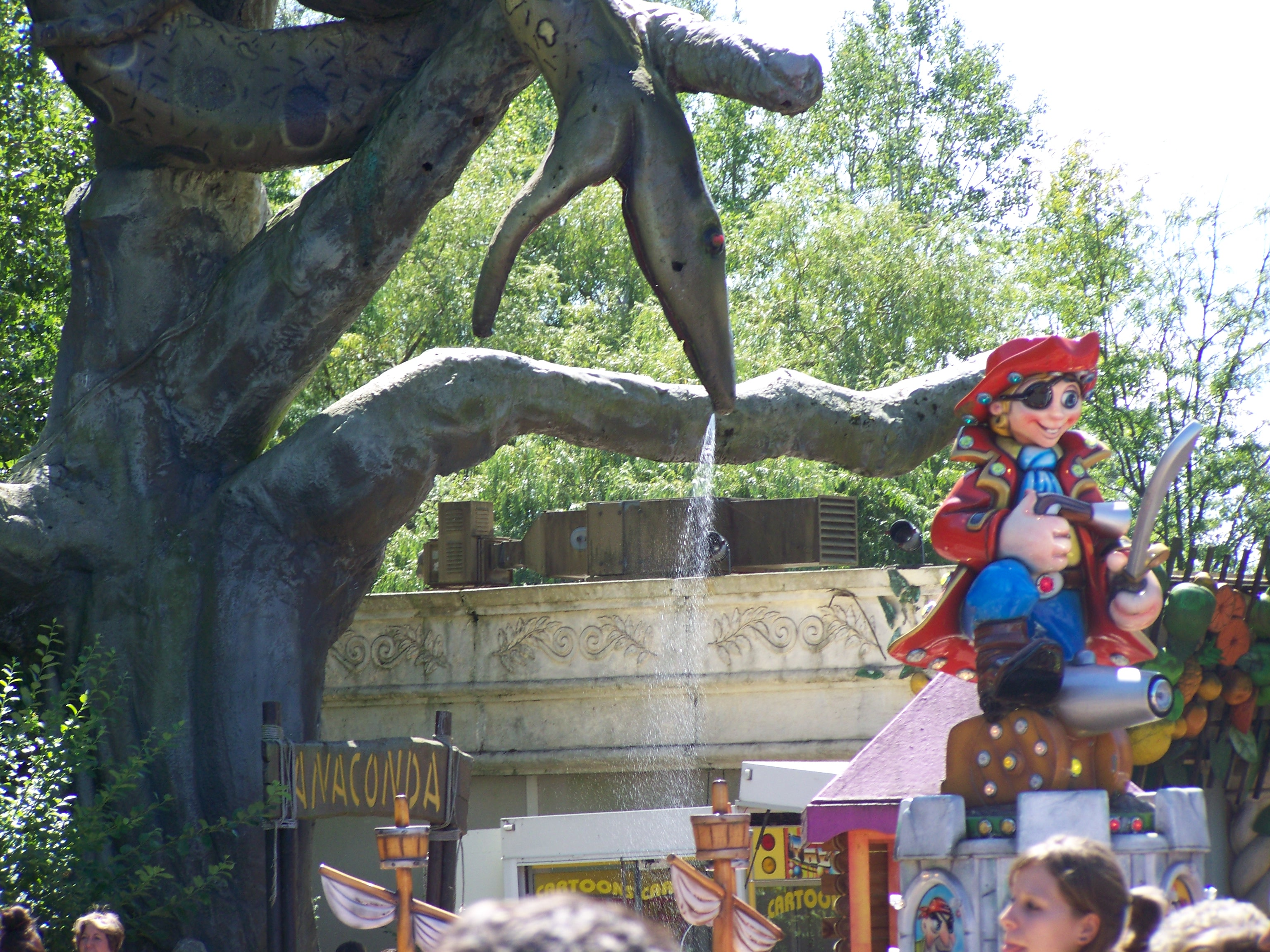 decor Walygator Parc